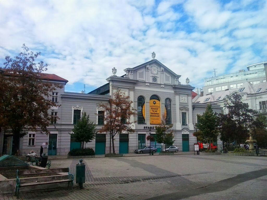 Bratislava